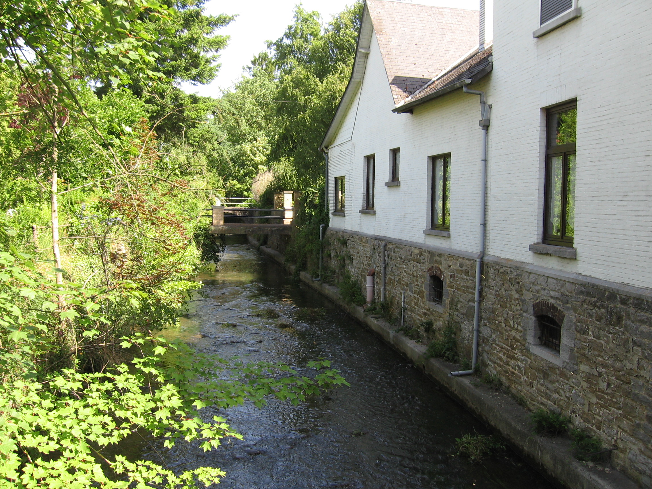 La rivière 'Orneau', passant à Mazy en Belgique